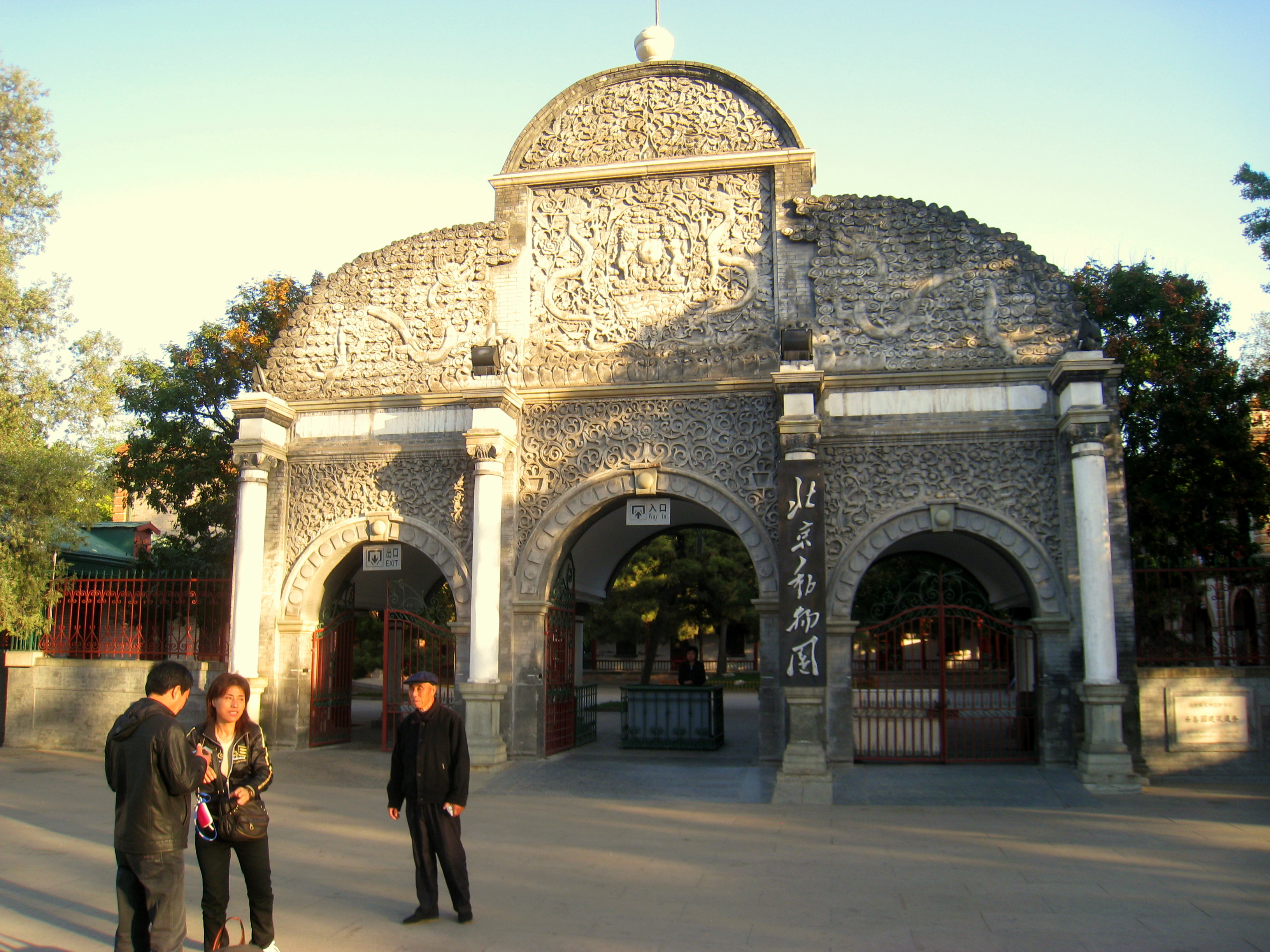 Beijing Zoo (北京动物园), Beijing, China.